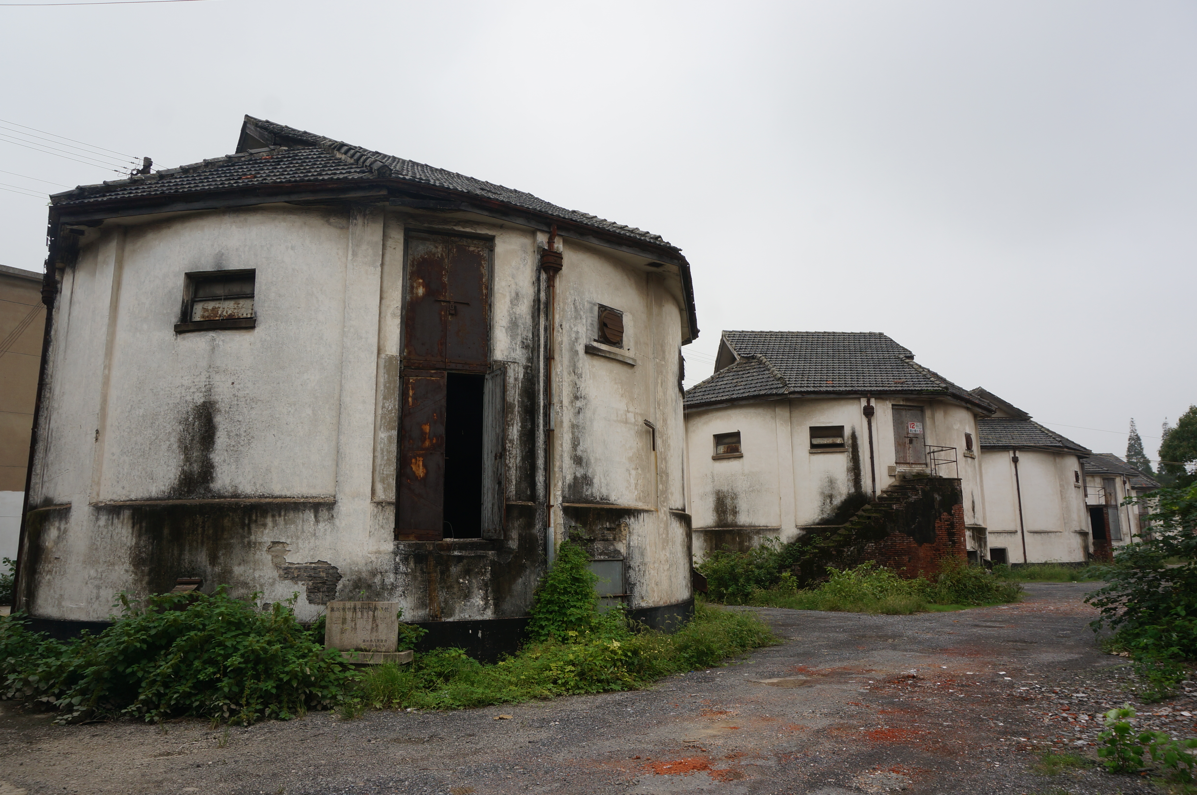 王店镇米厂苏式圆筒粮仓群，自西南侧看。